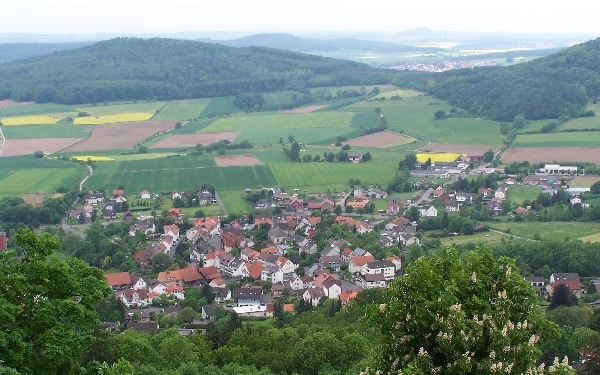 Niedenstein in Hessen, Deutschland; Blick vom Hessenturm auf dem Niedensteiner Kopf. Hinten links der Emser Berg, rechts am Bildrand die Altenburg. Zwischen Emser Berg und Altenburg der Ortsteil Sand von Bad Emstal, dahinter am Horizont die Weidelsburg bei Naumburg.